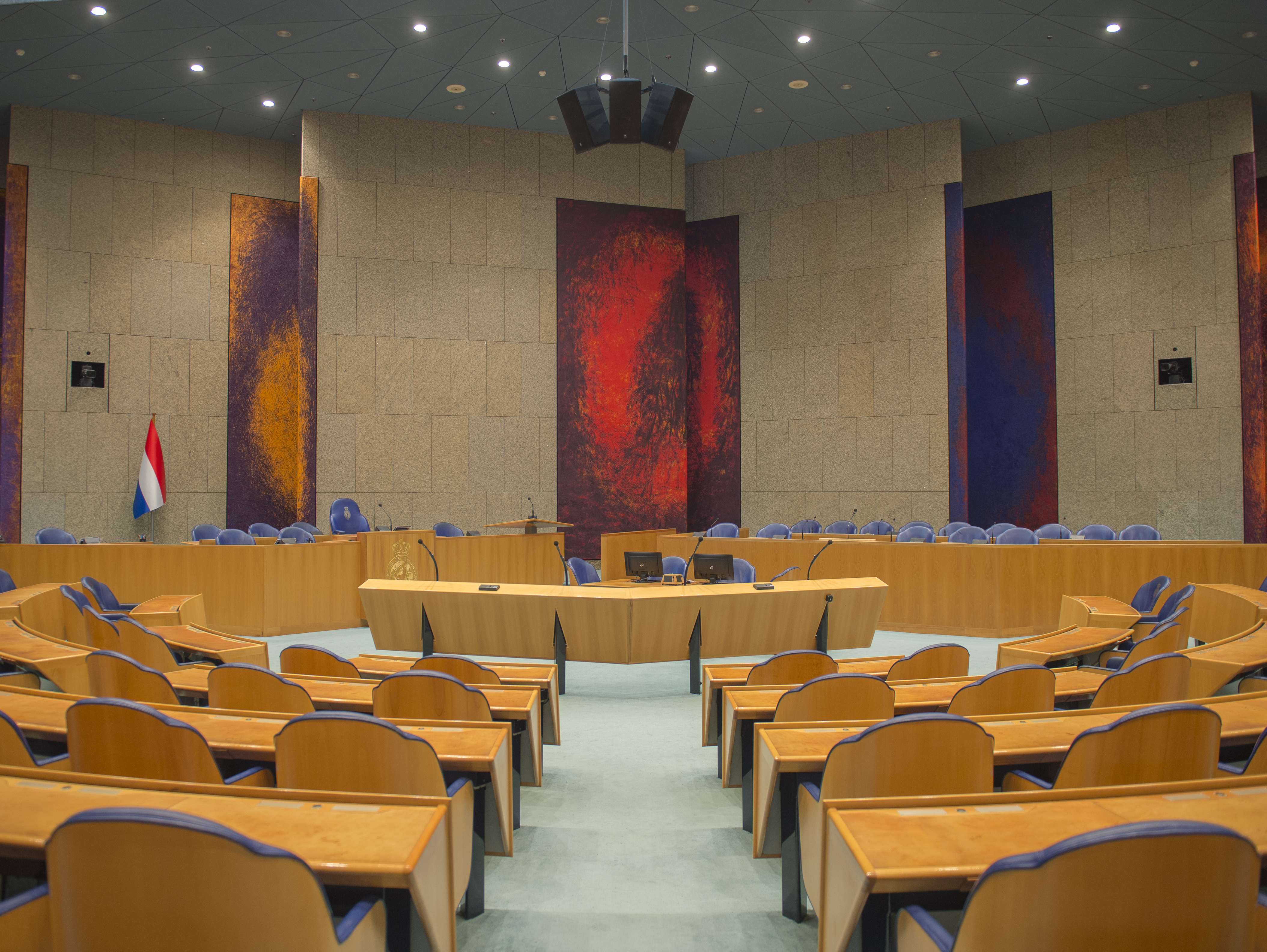 Parlamento Holandés, La Haya, Holanda